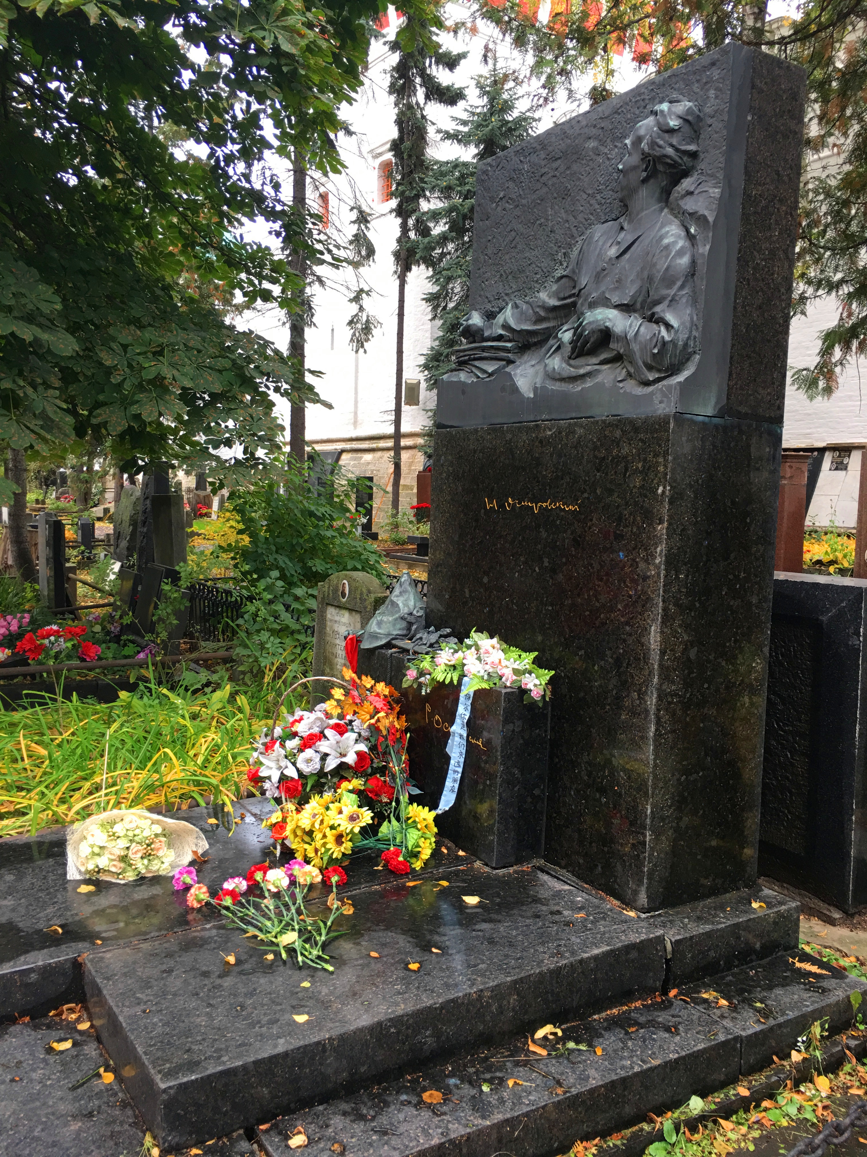 中文（中国大陆）: 位于新圣女公墓的奥斯特洛夫斯基墓